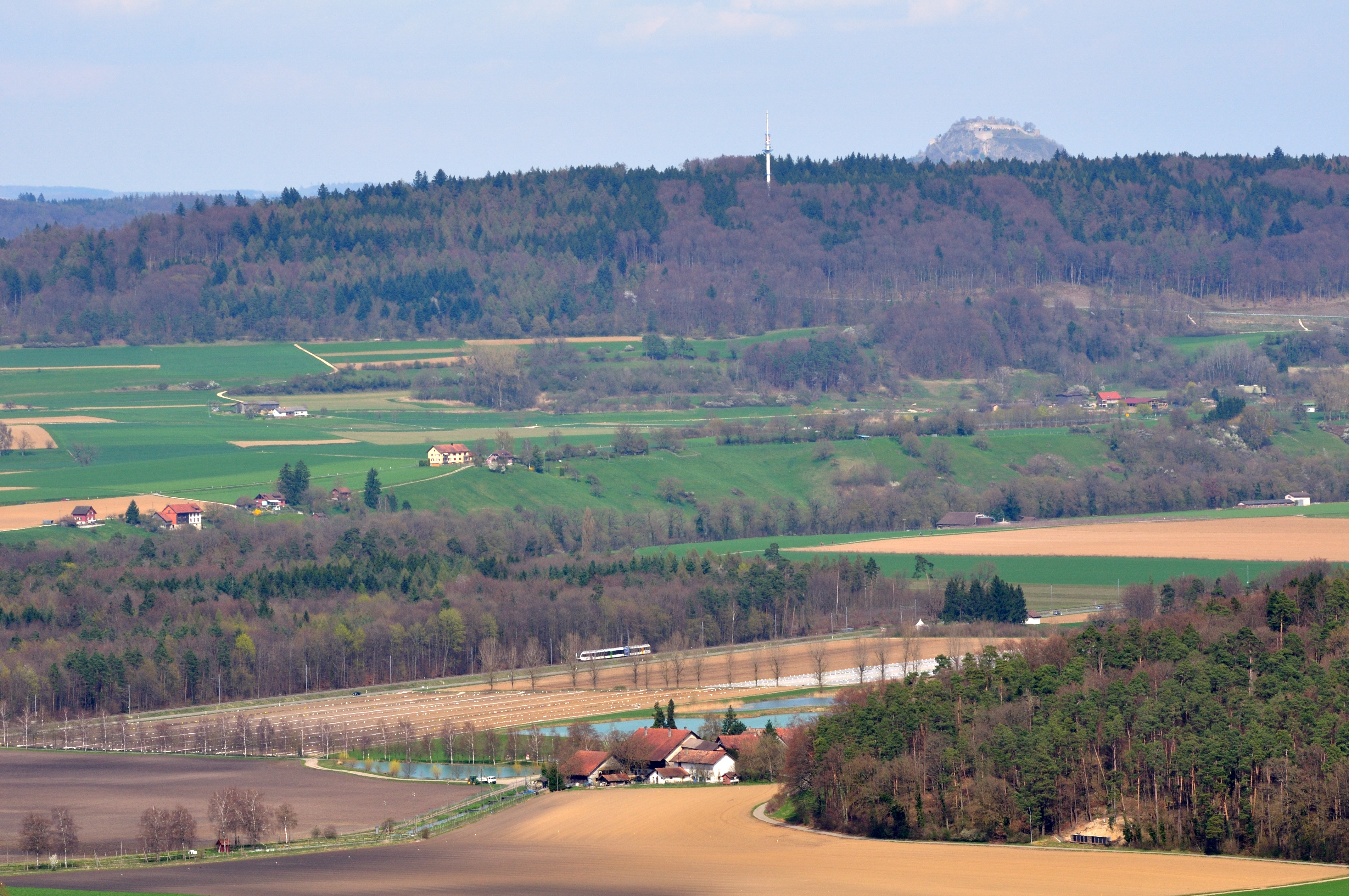 Switzerland, Canton of Zürich, Aussicht vom Aussichtsturm Hochwacht Wildensbuch, im Vordergrund Kundelfingerhof und Bahnstrecke Schaffhausen–Kreuzlingen, im Hintergrund das deutsche Rheinufer und der Hohentwiel